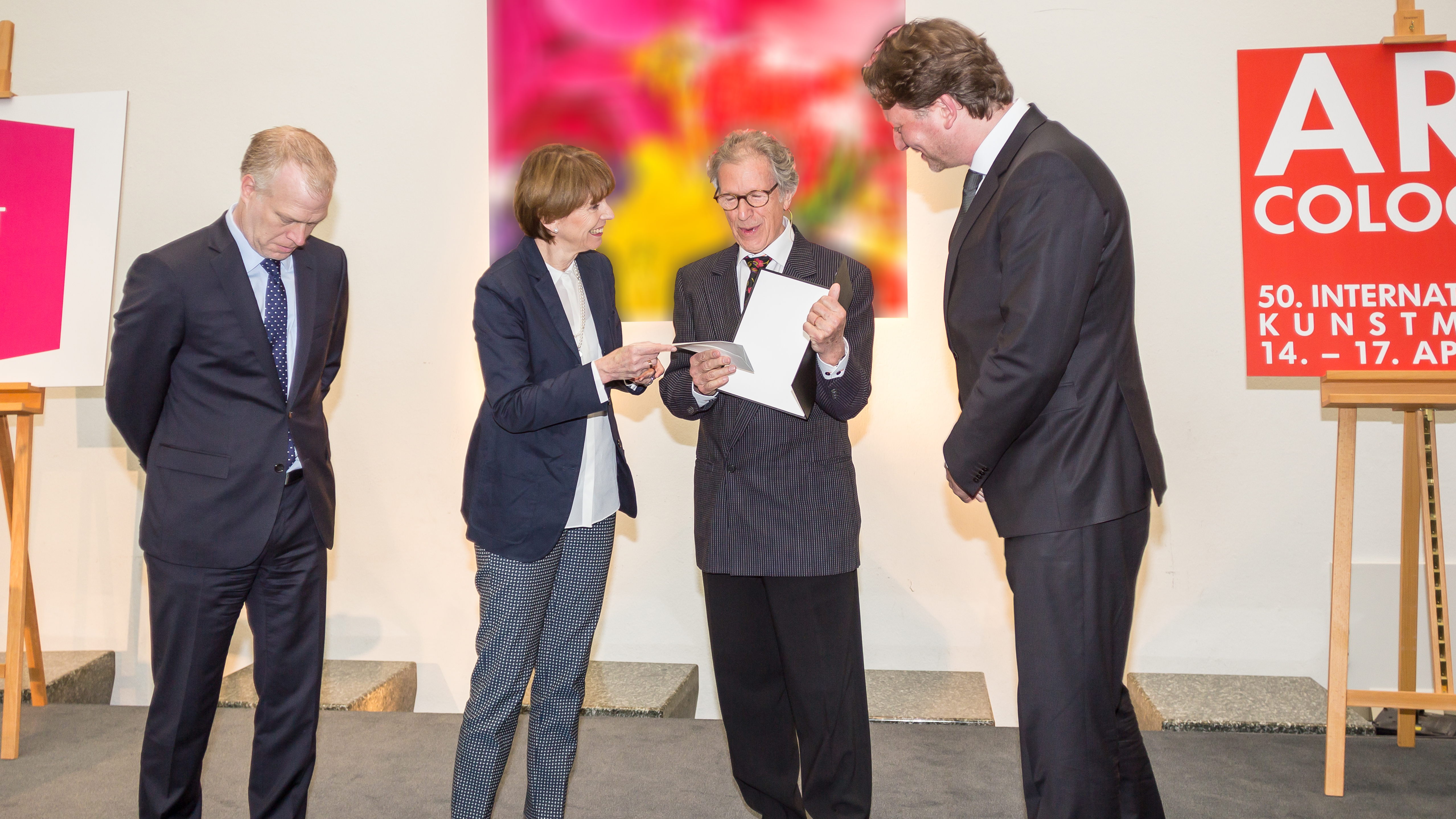 Verleihung des Art Cologne Preises 2016 an den Galeristen und Kunsthändler Raimund Thomas in der Piazette des Historischen Rathauses von Köln Foto: Überreichung des Preises an Raimund Thomas durch Oberbürgermeisterin Henriette Reker (2.v.l.) und Kristian Jarmuschek, Vorsitzender des Bundesverbandes Deutscher Galerien und Kunsthändler (BVDG) (1.v.r).